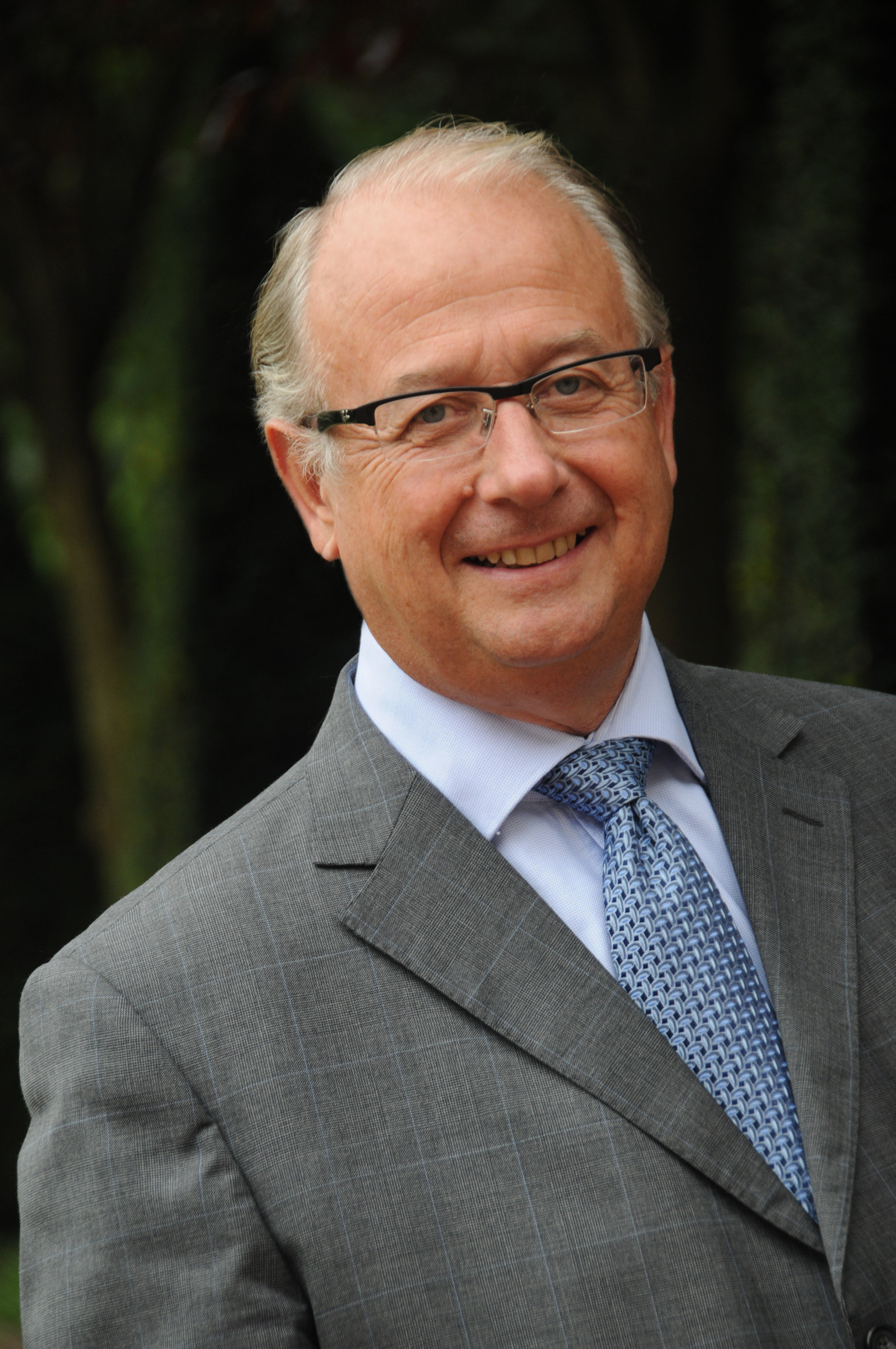 Bernard GÉRARD, Député-Maire de Marcq-en-Barœul